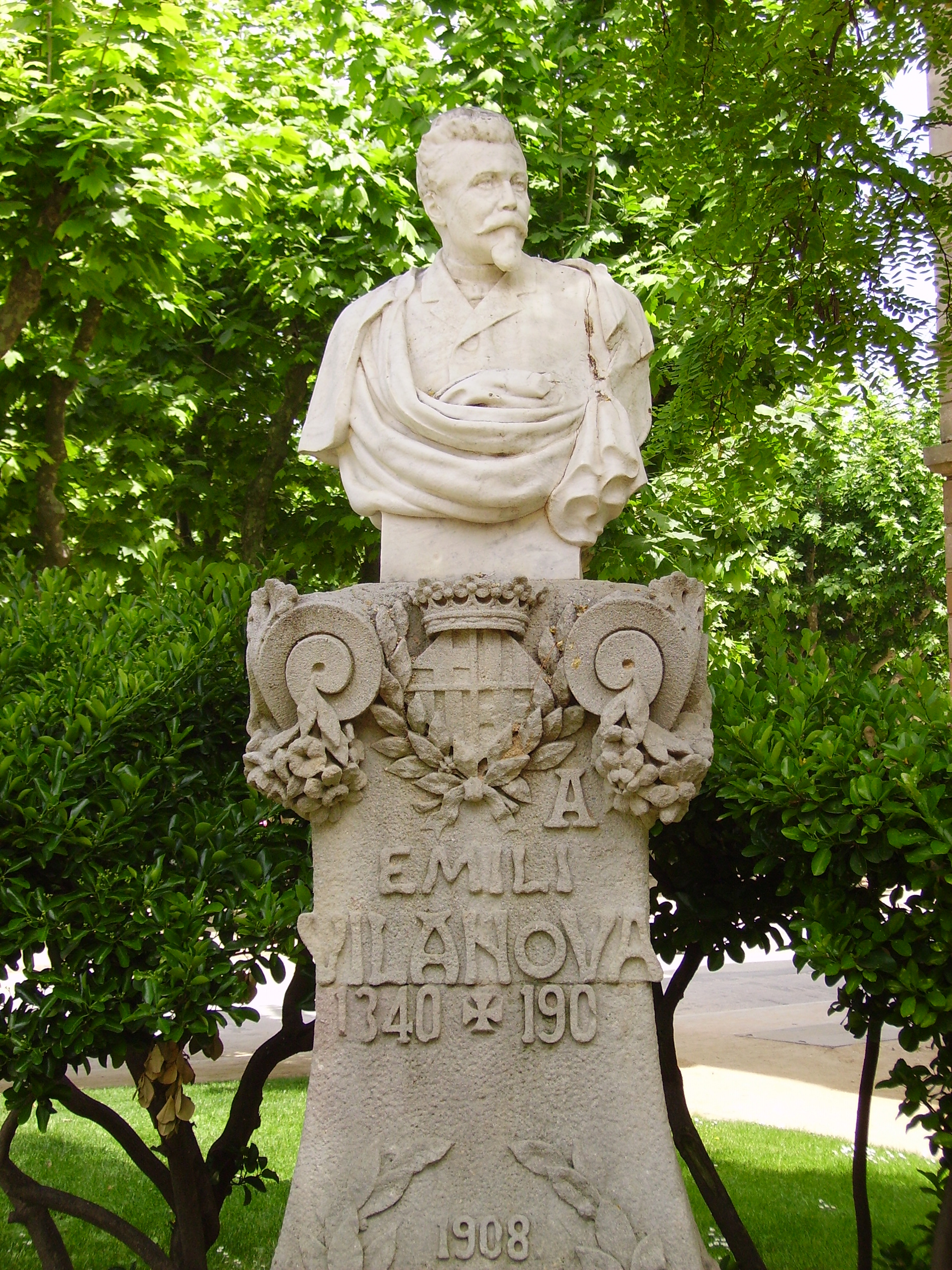 Bust d'Emili Vilanova al Parc de la Ciutadella, Barcelona, Catalunya. En marbre, obra de l'escultor Pere Carbonell, i peanya en pedra projectada per Bonaventura Bassegoda.